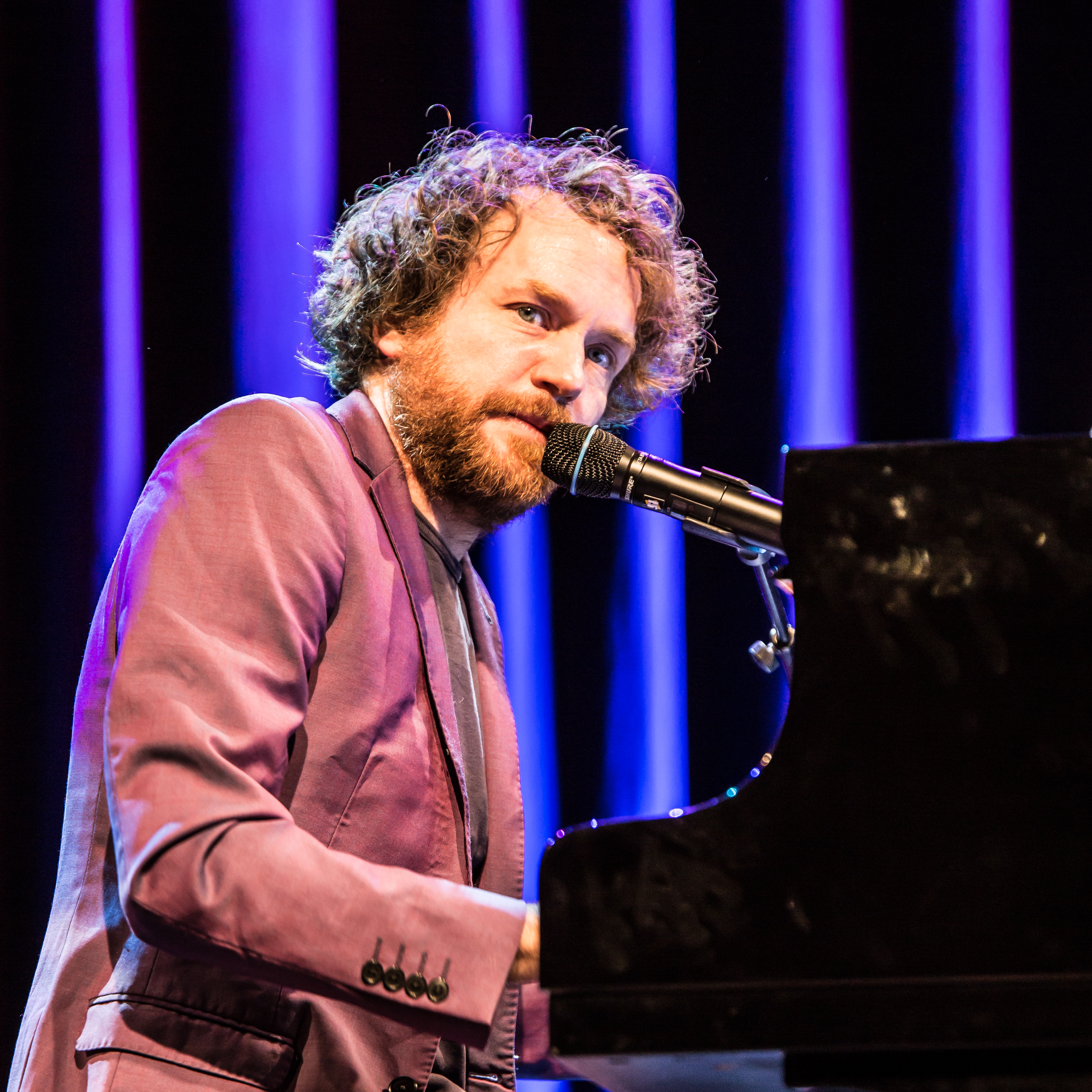 Der Komiker Friedemann Weise bei der Internationalen Kulturbörse Freiburg 2018